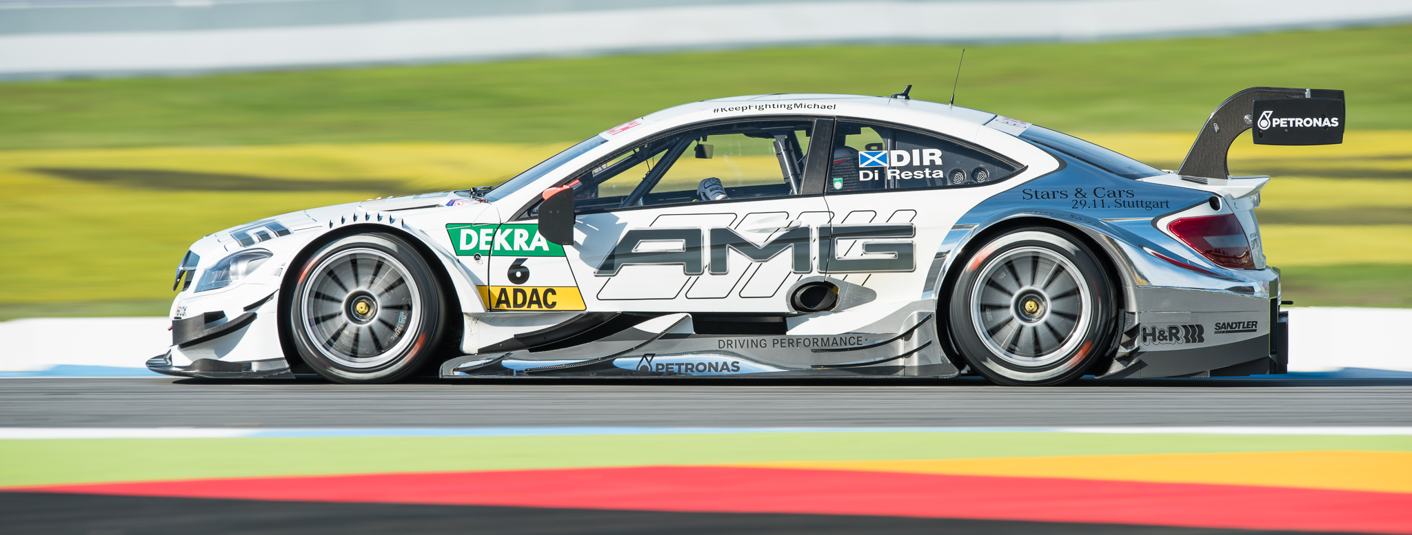 DTM,Deutsche Tourenwagen Masters,HWA AG,Hockenheimring,Mercedes AMG C-Coupe,Motorsport,Paul Di Resta